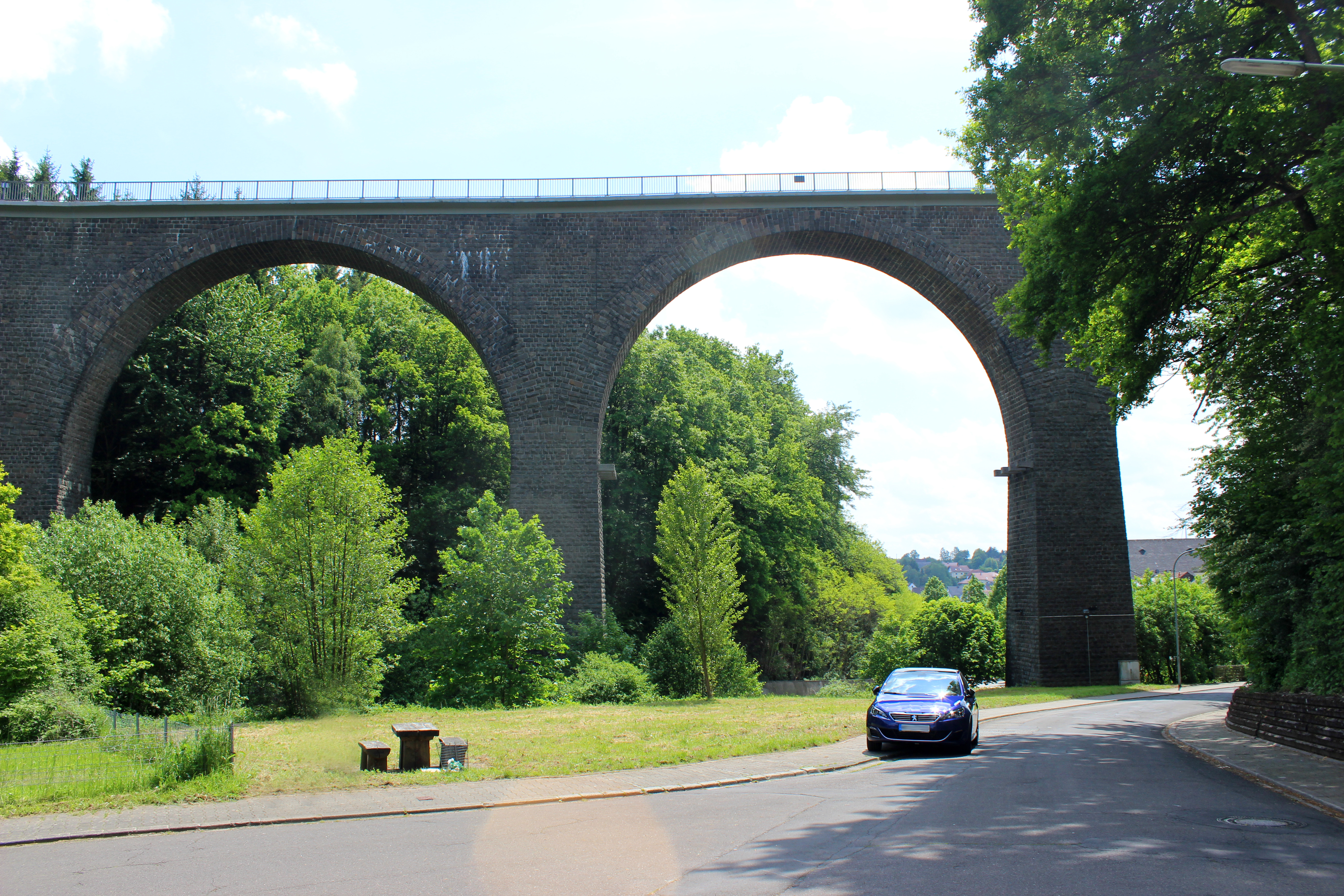 Talbrücke Oberkirchen, Gemeinde Freisen, Landkreis St. Wendel, Saarland